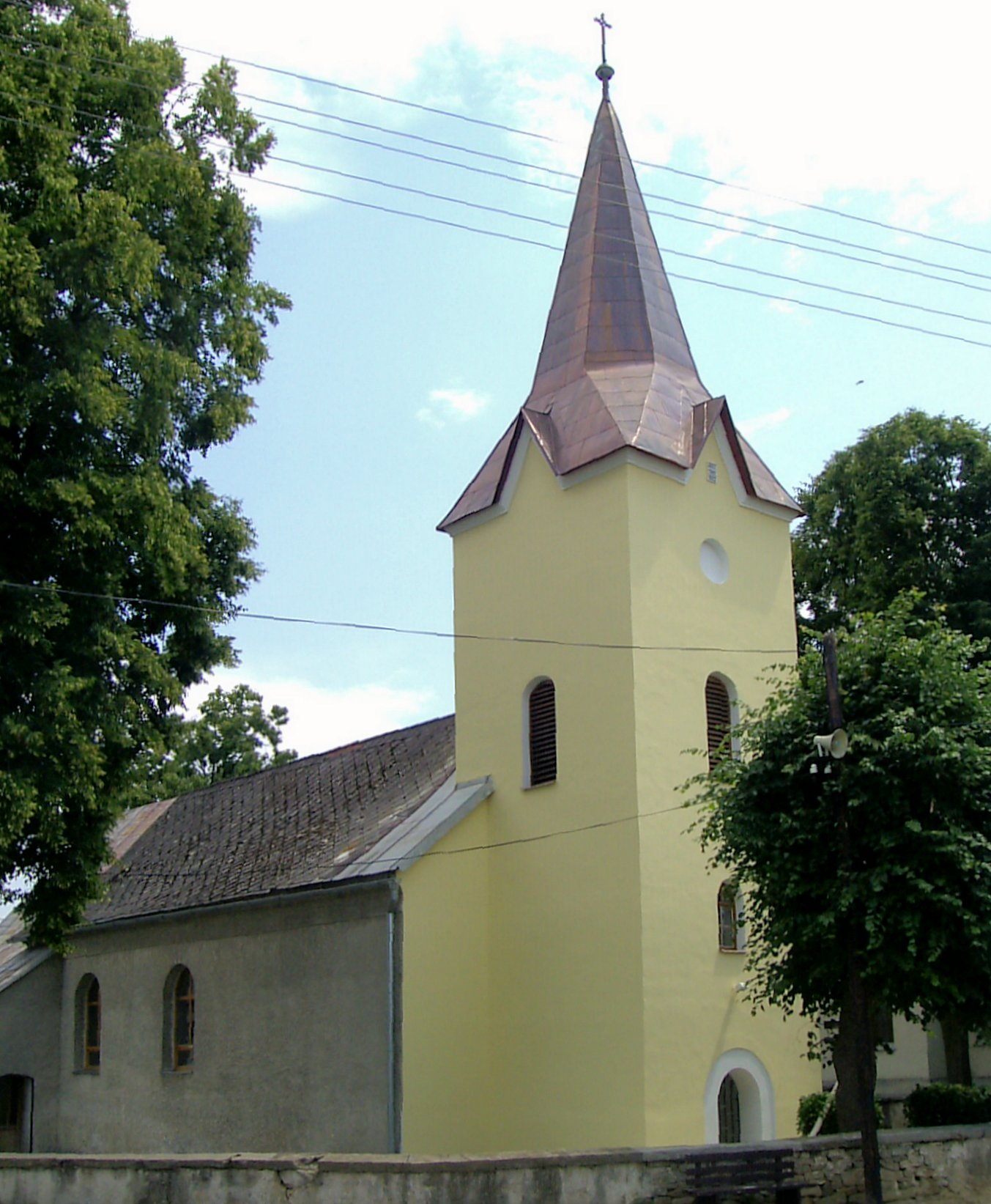 Stročín, Rímsko-katolícky kostol sv.Mikuláša